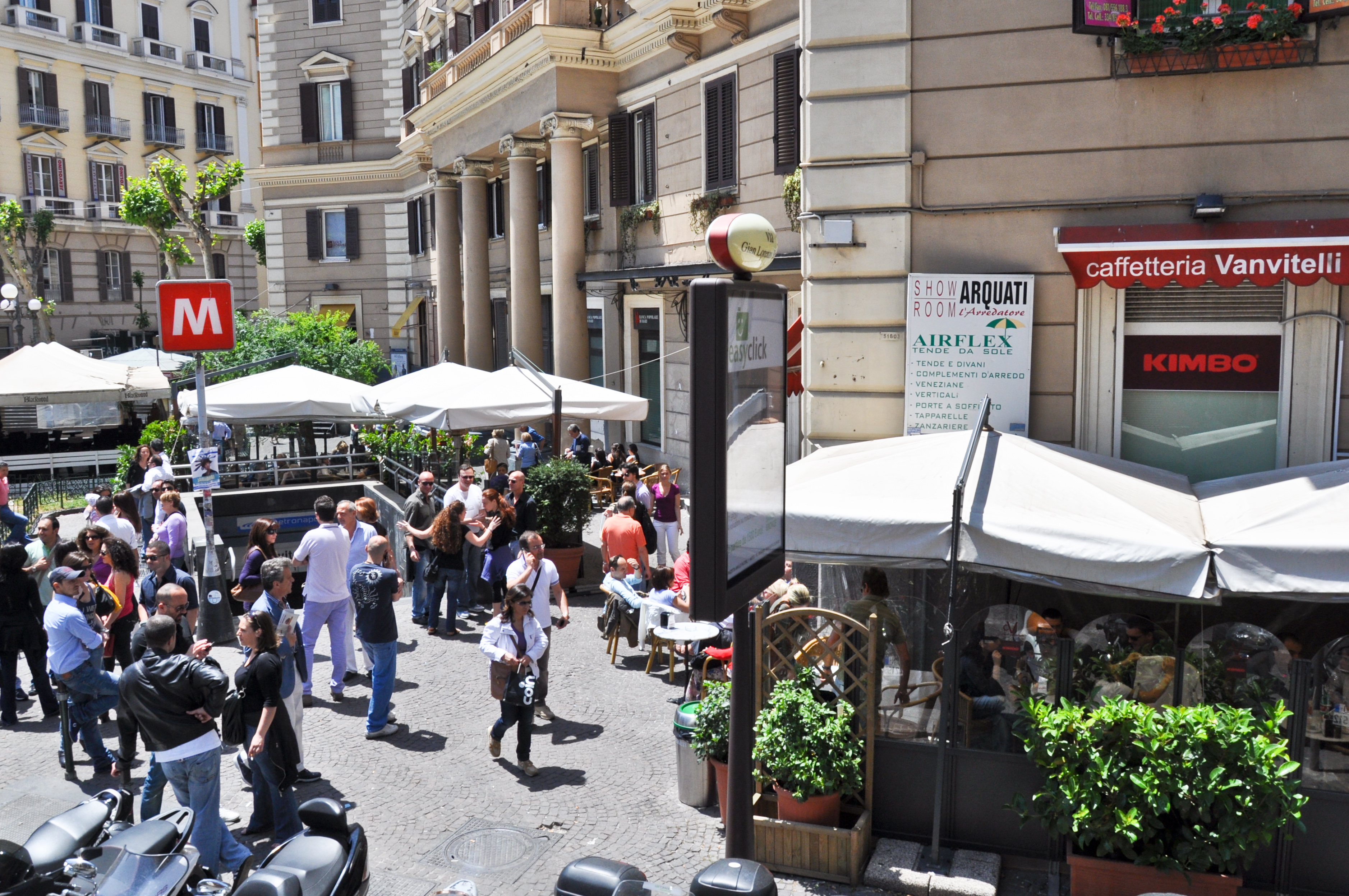 Piazza Vanvitelli (Napoli)